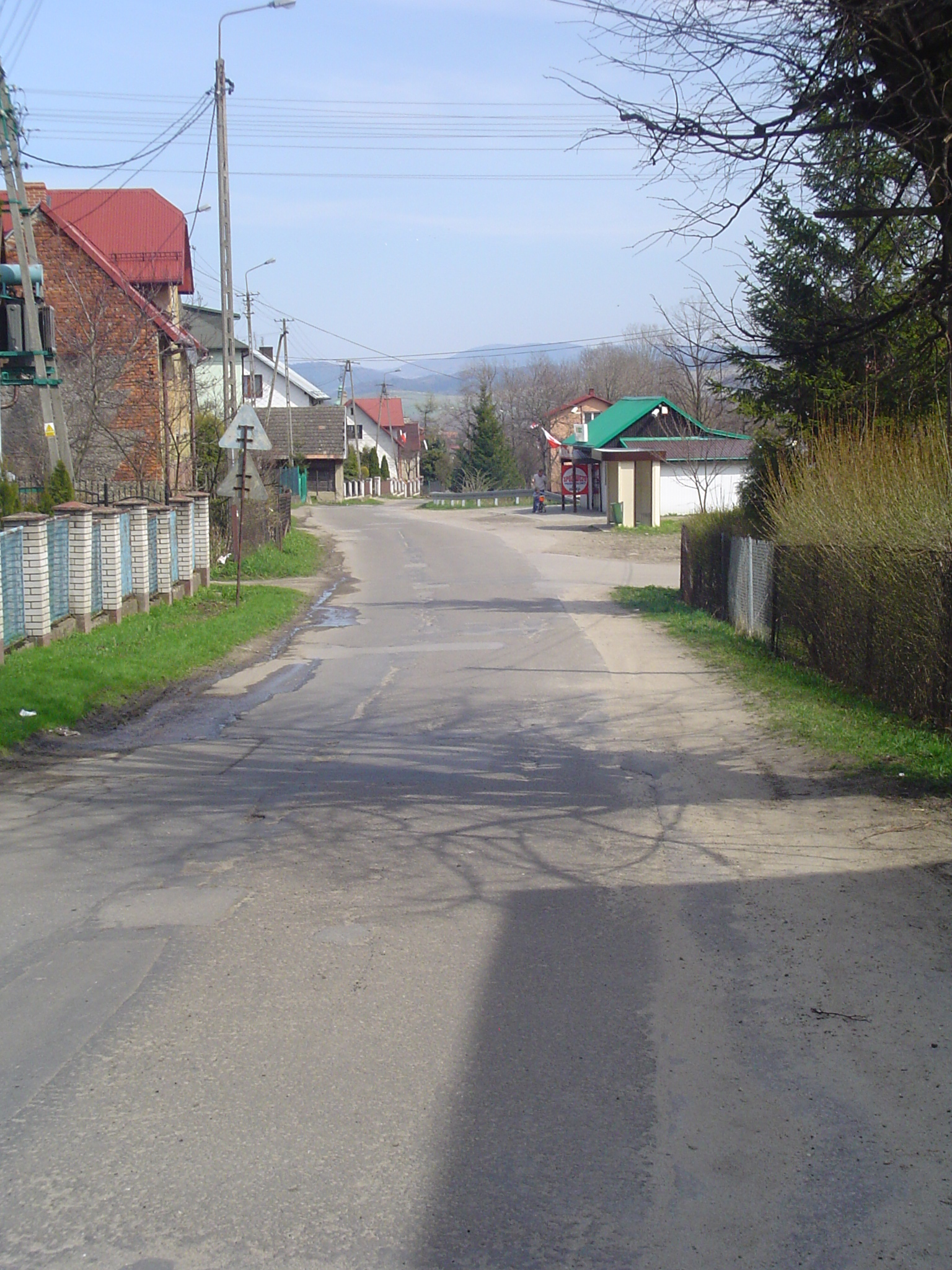 Ulica Świętego Marcina na wysokości przedostatniego przystanku autobusowego linii nr 5 (MZK Żywiec).